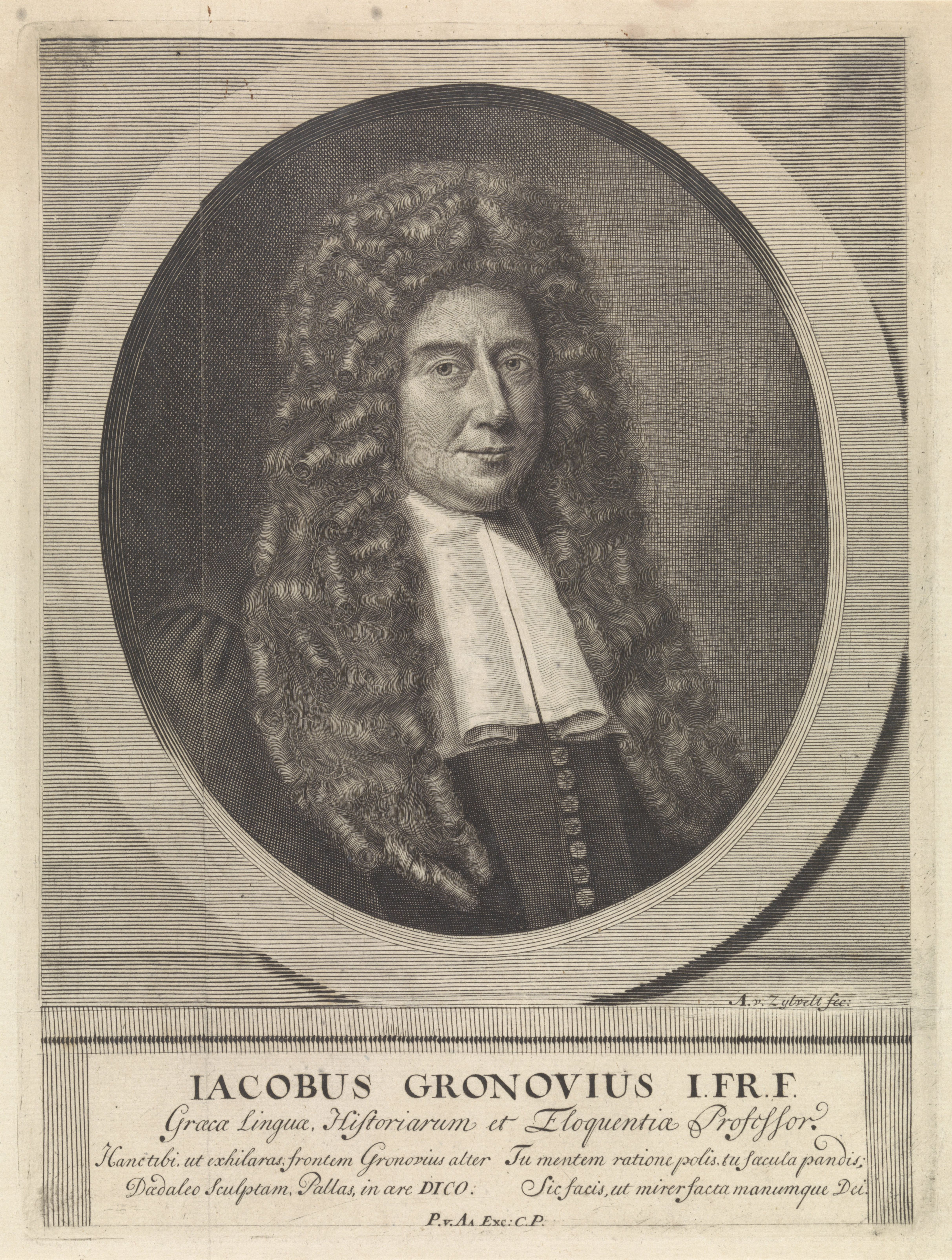 IdentificatieTitel(s): Portret van Jacob GronoviusObjecttype: prent boekillustratie Objectnummer: RP-P-1906-2850Catalogusreferentie: Hollstein Dutch 35-1(2)Opschriften / Merken: verzamelaarsmerk, verso, gestempeld: Lugt 2228Omschrijving: Portret van Jacobus Gronovius, hoogleraar in het Grieks en de welsprekendheid te Leiden, gekleed in toga met witte bef. Onder het portret zijn naam, functie en vier tekstregels in het Latijn.VervaardigingVervaardiger: prentmaker: Anthony van Zijlvelt (vermeld op object)uitgever: Pieter van der Aa (I) (vermeld op object)verlener van privilege: onbekend (vermeld op object)Plaats vervaardiging: LeidenDatering: 1693Fysieke kenmerken: gravureMateriaal: papier Techniek: graveren (drukprocedé)Afmetingen: plaatrand: h 234 mm × b 176 mmToelichtingPrent gebruikt in: Marcellinus, Ammianus. Rerum gestarum qui de XXXI supersunt, libri XVIII. [Vertaald en geredigeerd door] Jacobus Gronovius. Leiden: Pieter van der Aa (I), 1693.OnderwerpWie: Jacob GronoviusVerwerving en rechtenCredit line: Schenking van J.C. OvervoordeVerwerving: schenking 1906Copyright: Publiek domein